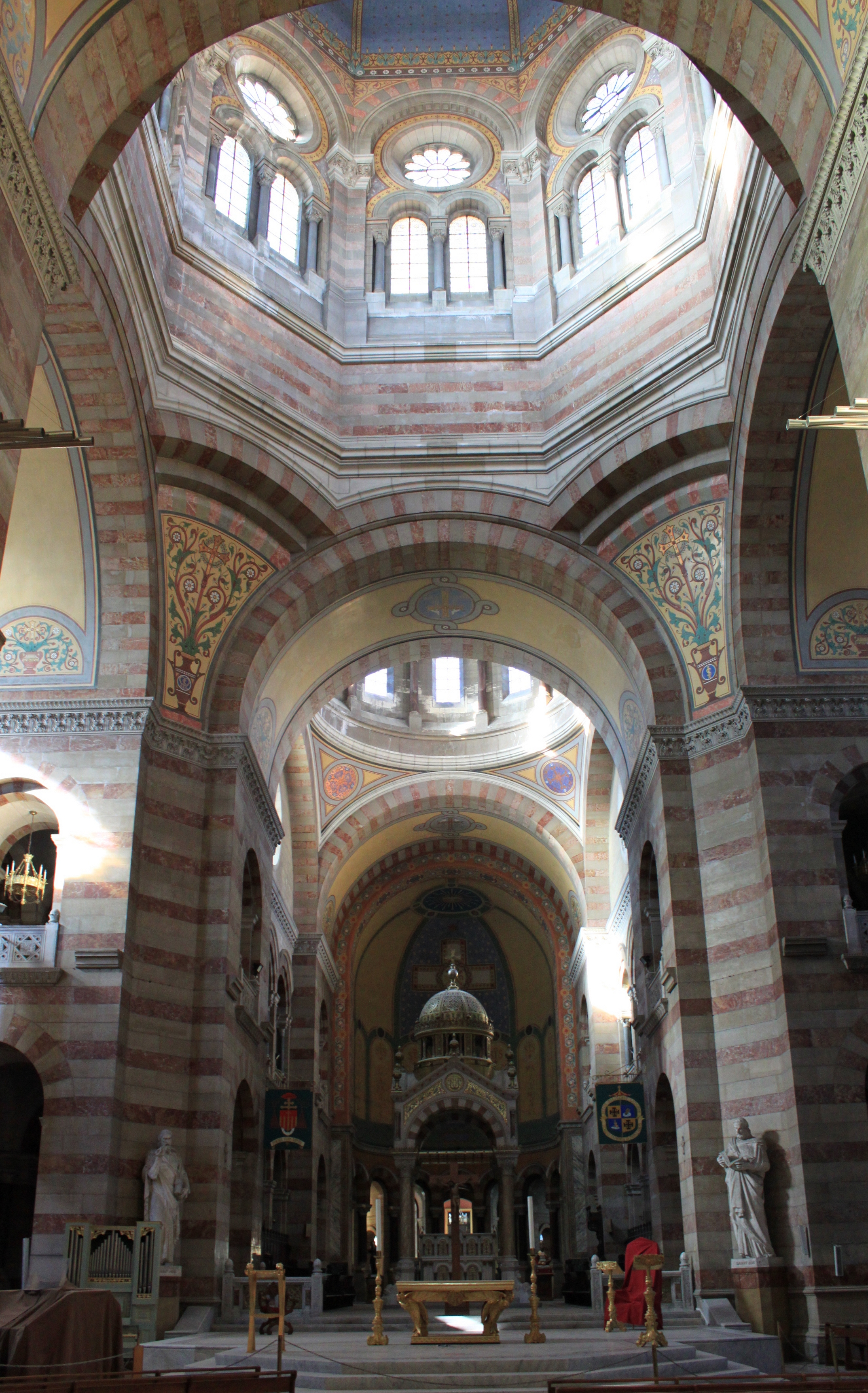 Cathédrale de la Major, Marseille, FRANCE